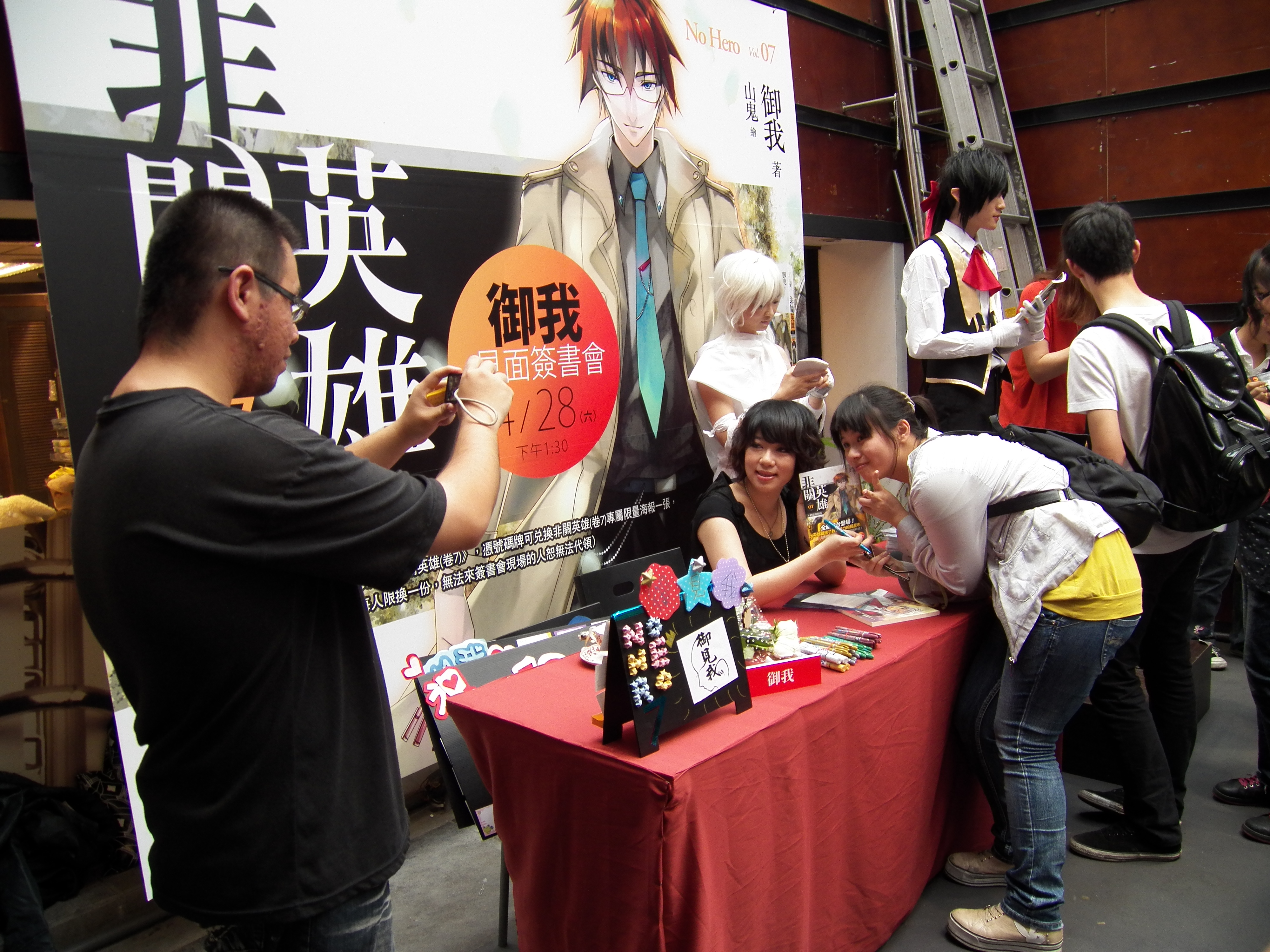 御我＜非關英雄＞第7卷簽書會，出版社工作人員為書迷與御我合影留念。